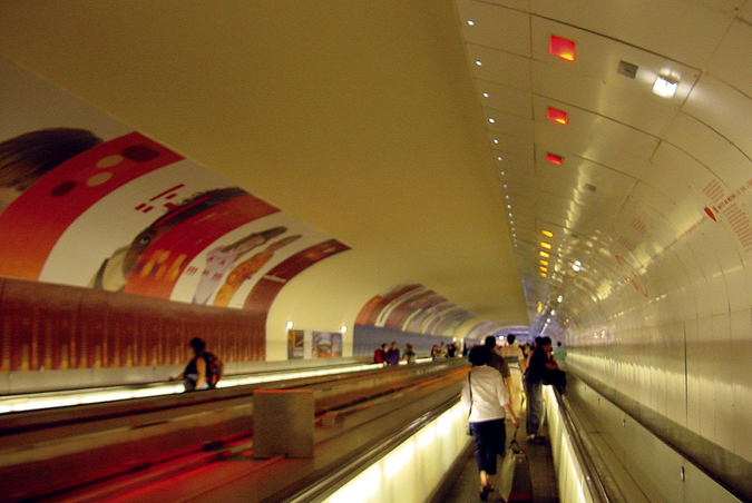 Metro, Montparnasse.